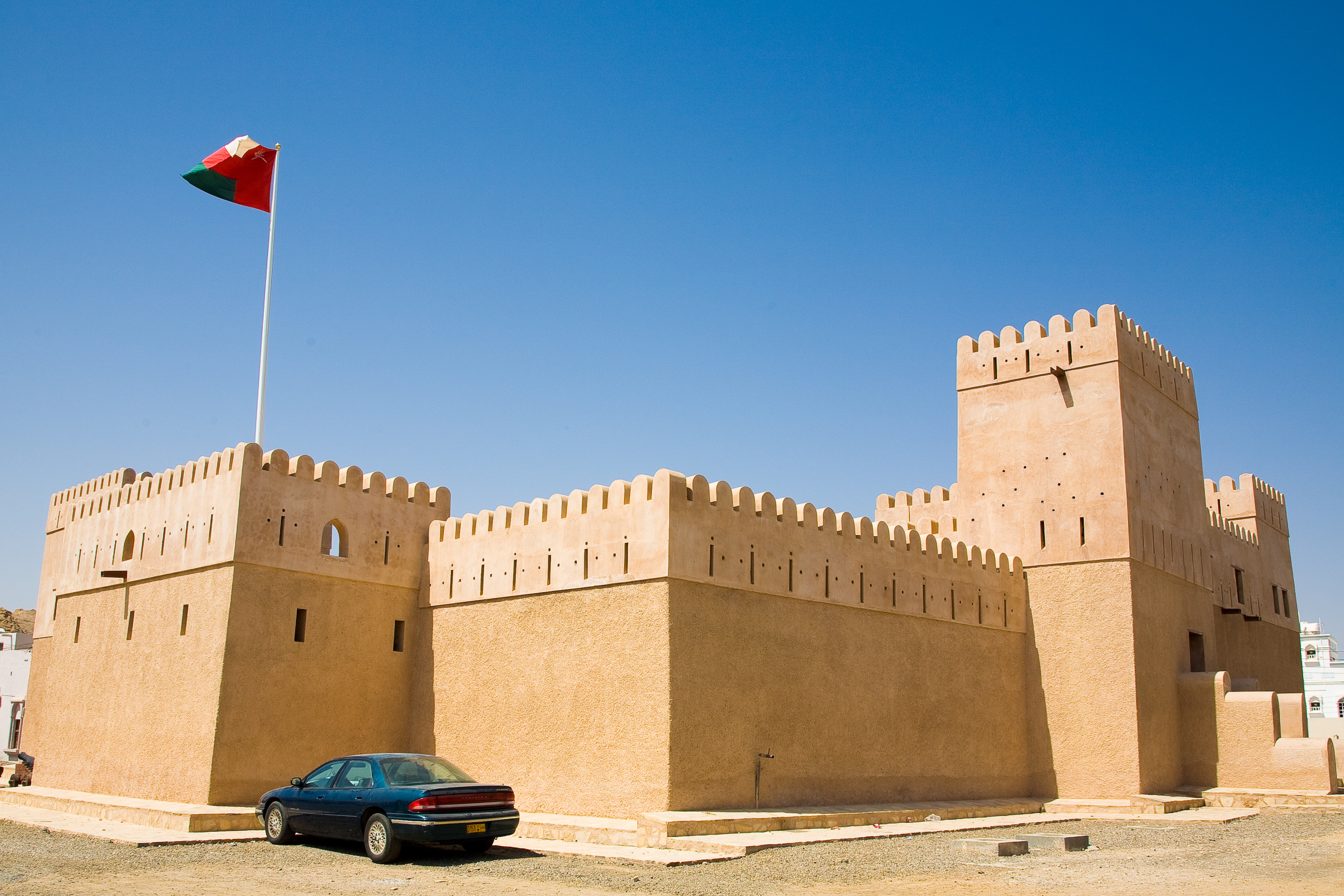 Sur, Oman